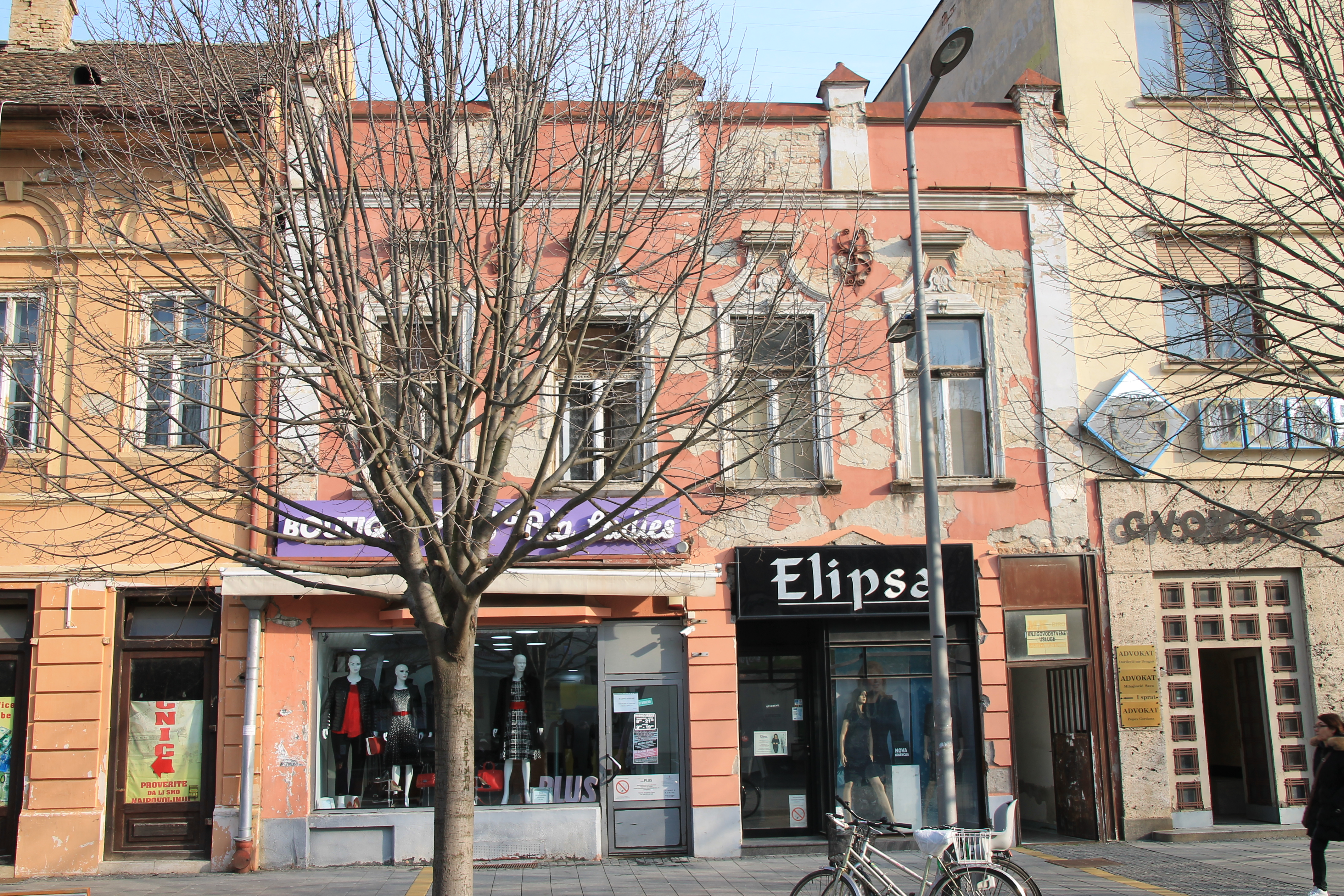 Staro jezgro Zrenjanina